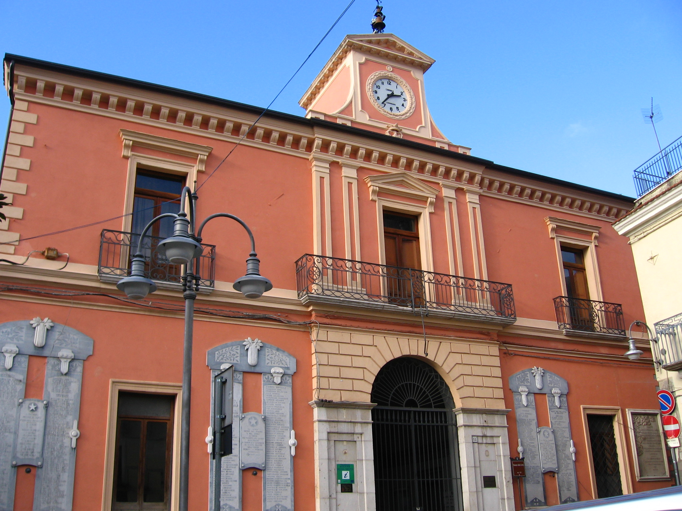 Antonio Autunno, scatto personale, Vecchio Palazzo Comunale